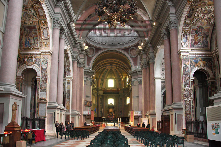 Interno della Basilica di San Gaudenzio a Novara